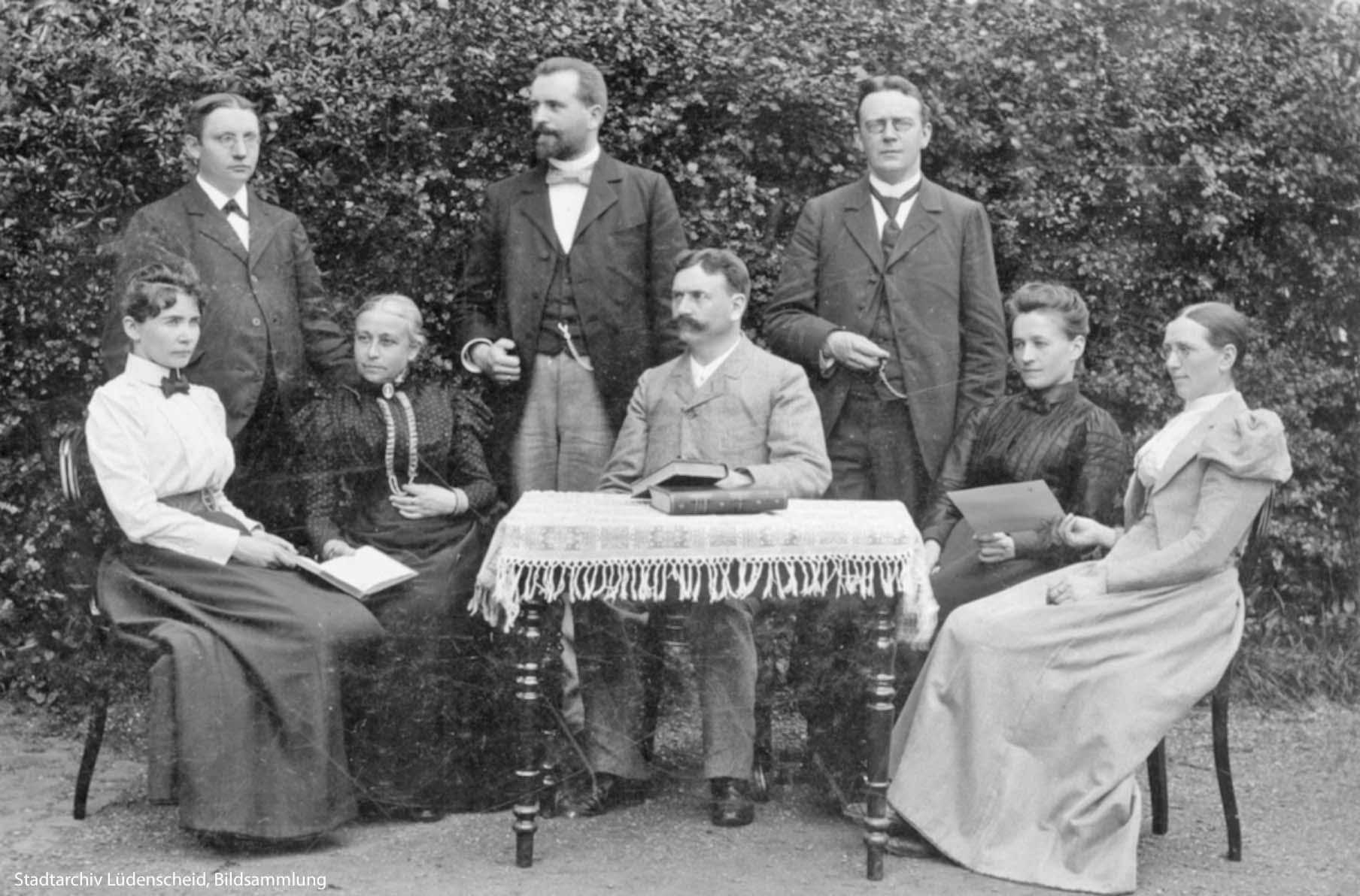 Das Bild zeigt das Kollegium des Lüdenscheider Lyzeums in der Besetzung der Jahre 1899 bis 1902, Es ist im Archiv der Stadt Lüdenscheid zu besichtigen.